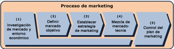 klother